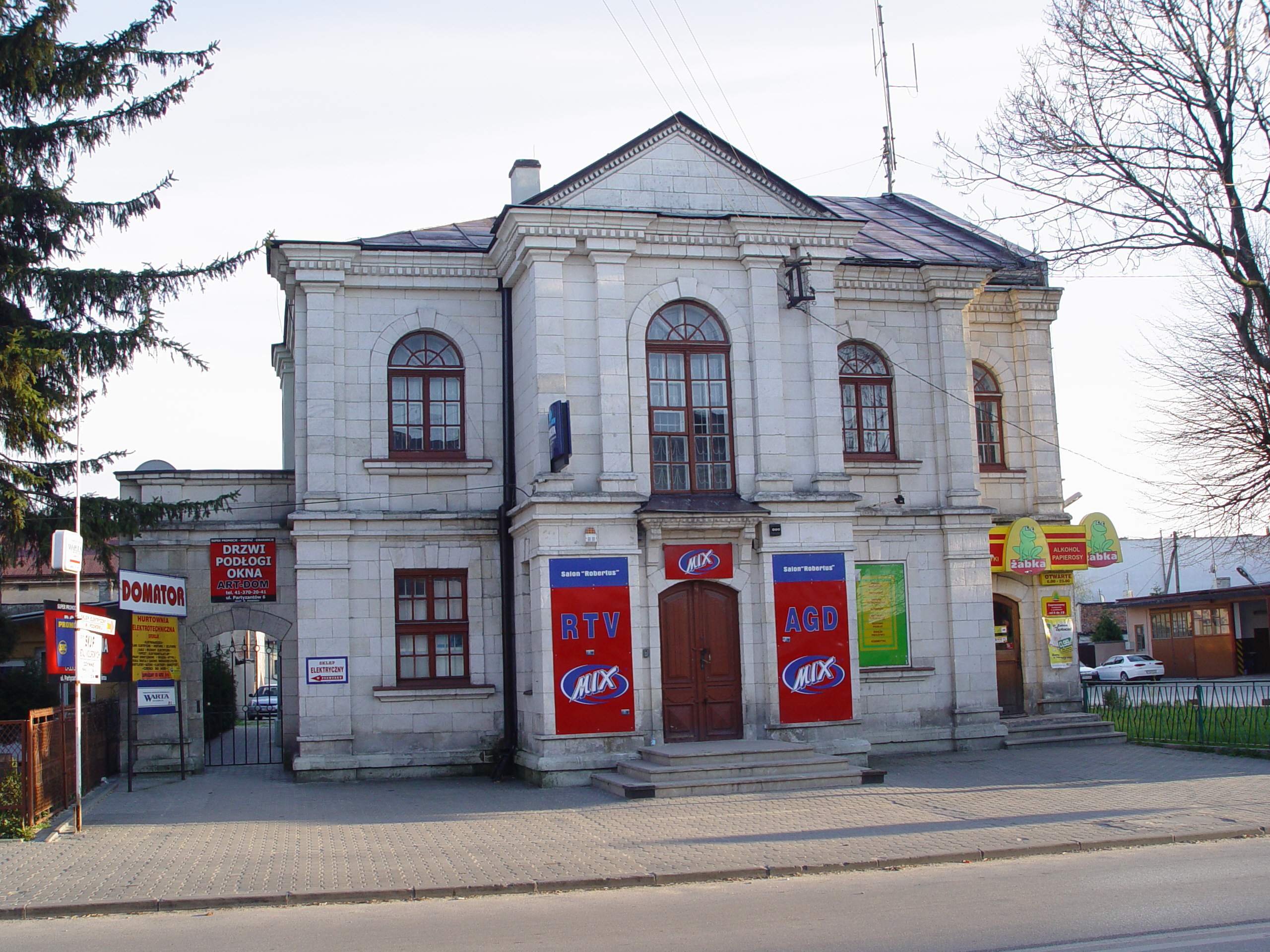 Busko-Zdrój, ul. Partyzantów 6 - synagoga, obecnie dom towarowy, 1929